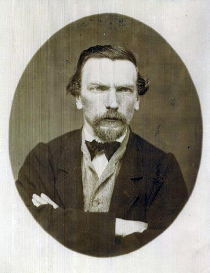 Innocenzo Manzetti, Italian inventor (1826-1877)